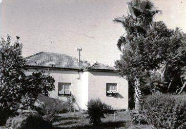 בית מהראשונים